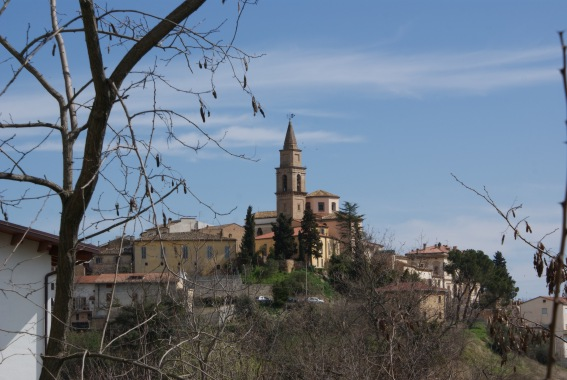 Vista del comune di Bellante